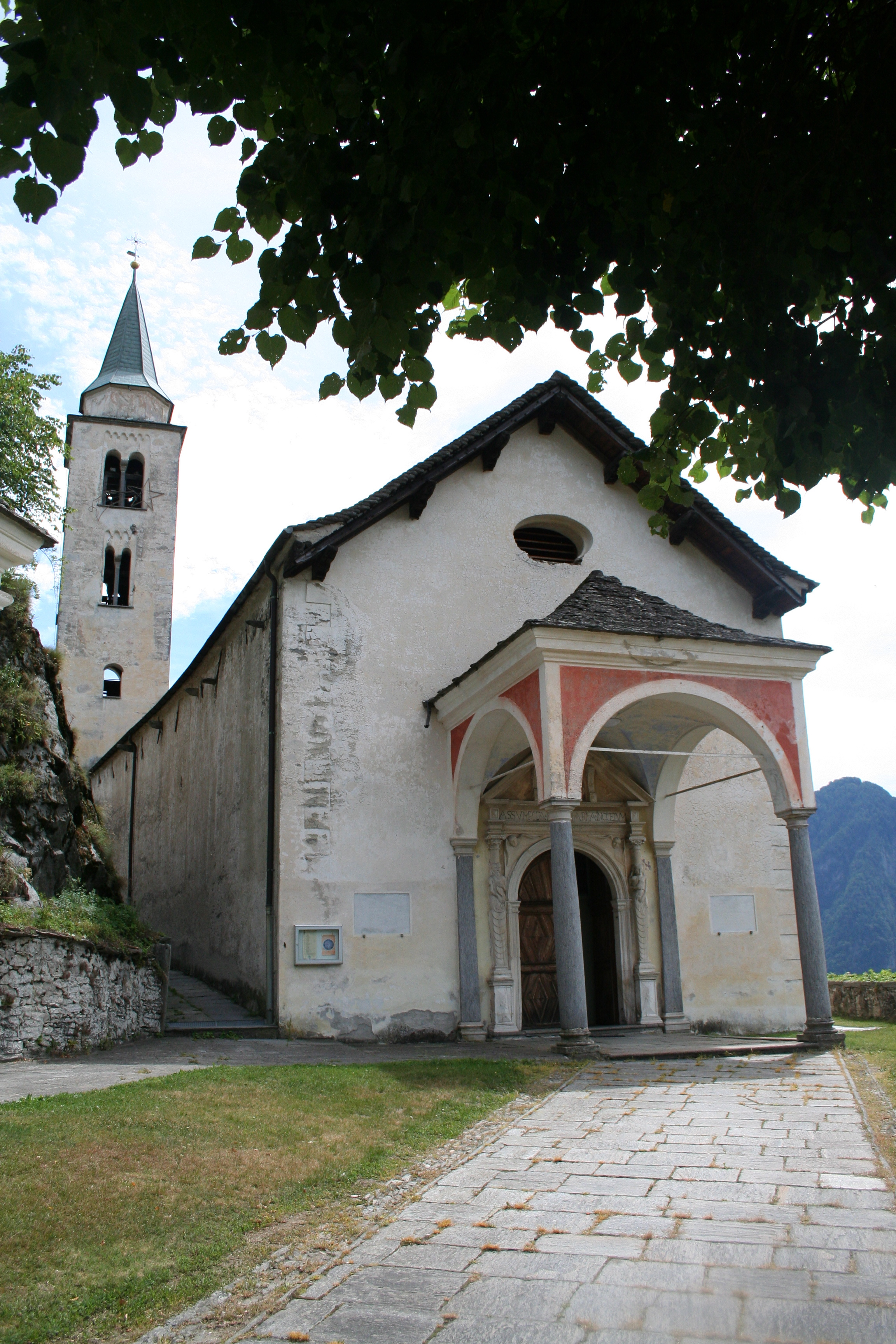 Kirche Sta. Maria Assunta Calanca: Eingangspartie